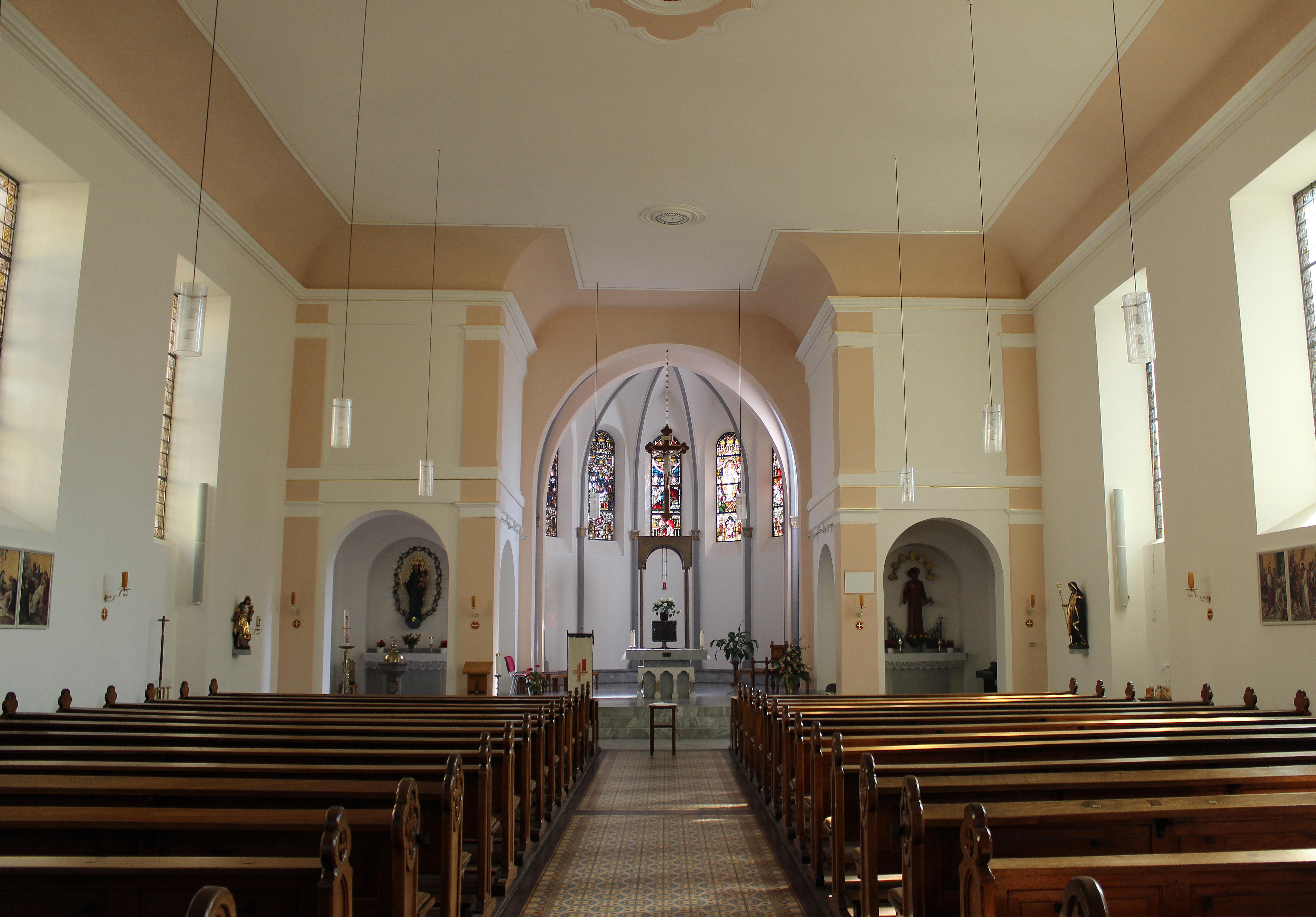 Blick ins Innere der katholischen Pfarrkirche Maria Geburt in Ottweiler, Landkreis Neunkirchen, Saarland